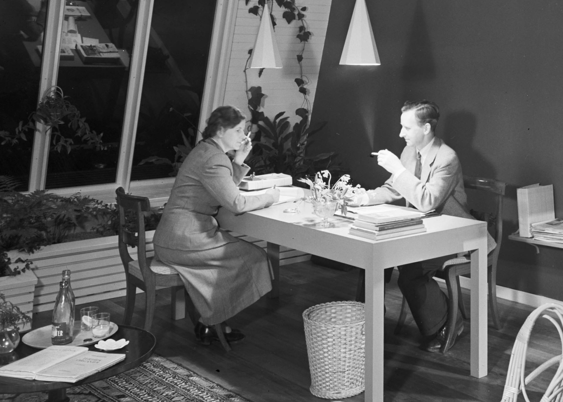 Villa Molin, trädgårdsarkitekten Ulla Molins villa på Lidingö, ritad av Ralph Erskine 1947 (Ulla Molin och K.G. Molin)